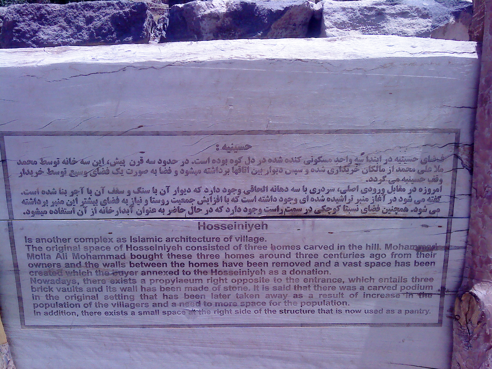 تاریخچه حسینیه میمند